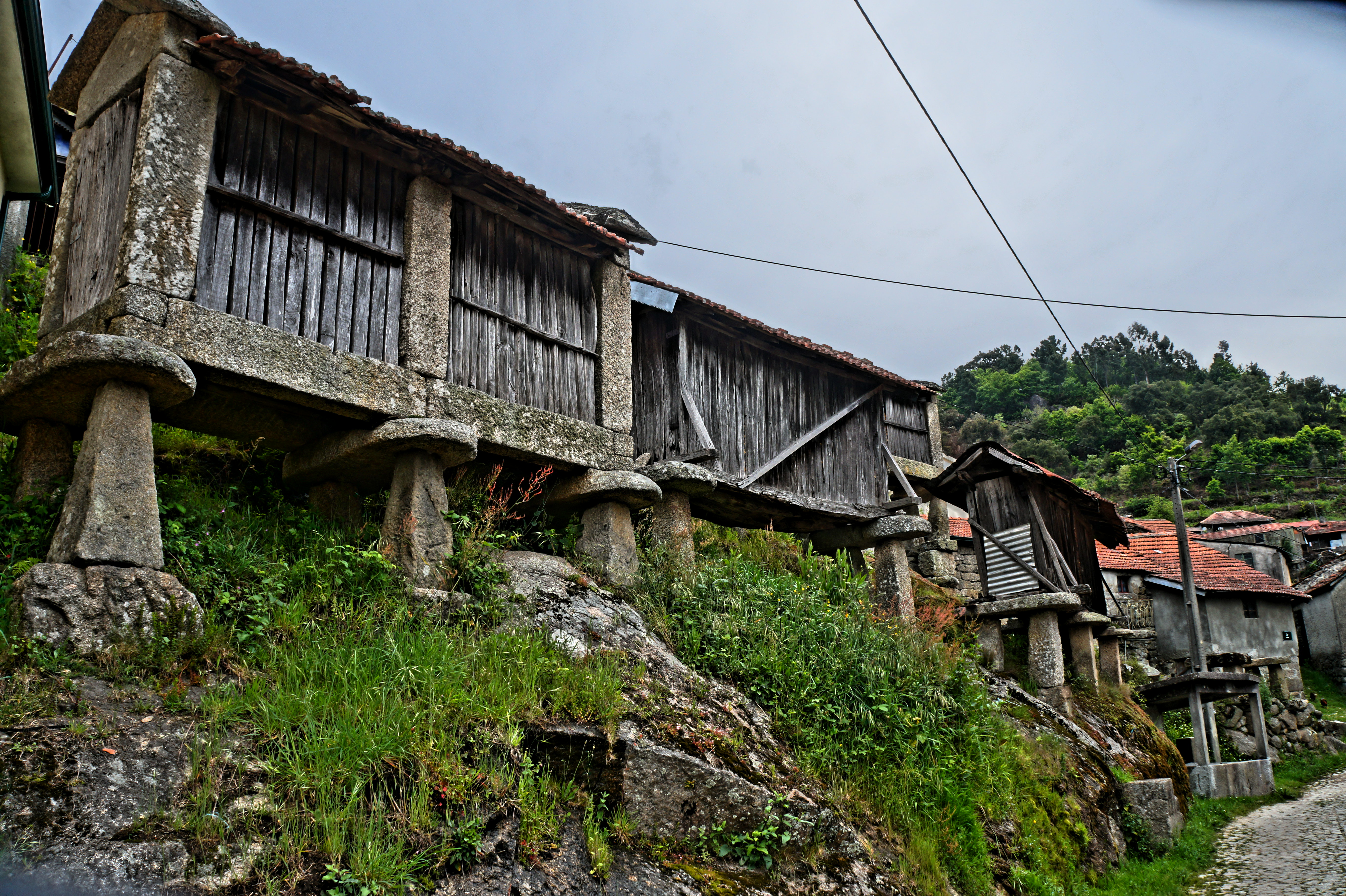 Bateria de espigueiros Canedo (Ribeira de Pena